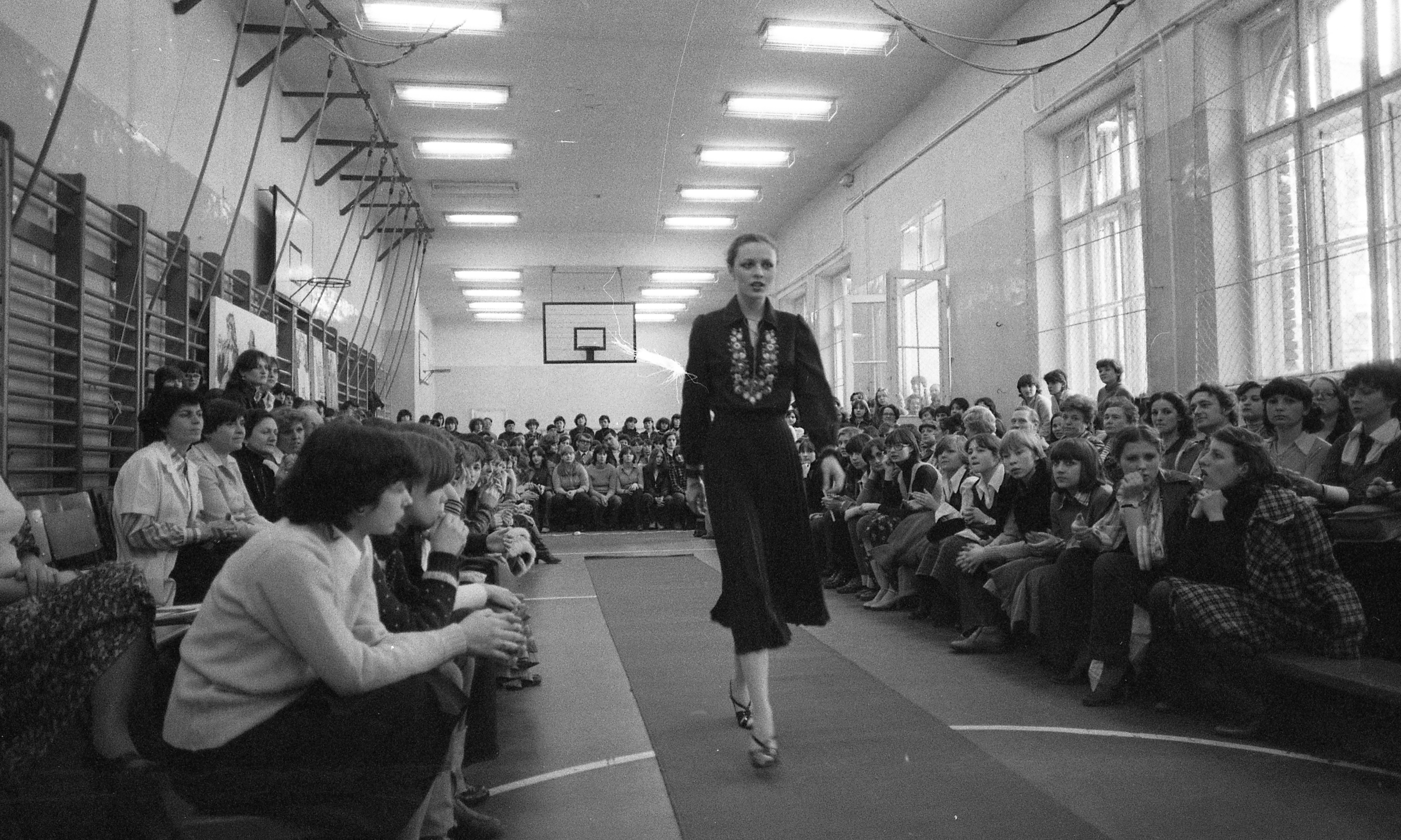 Rákóczi tér 4., Varga Katalin Ruhaipari Szakközépiskola. Kristyán Judit manöken Location: Hungary, Budapest VIII. Tags: Budapest Title: Rákóczi tér 4., Varga Katalin Ruhaipari Szakközépiskola.